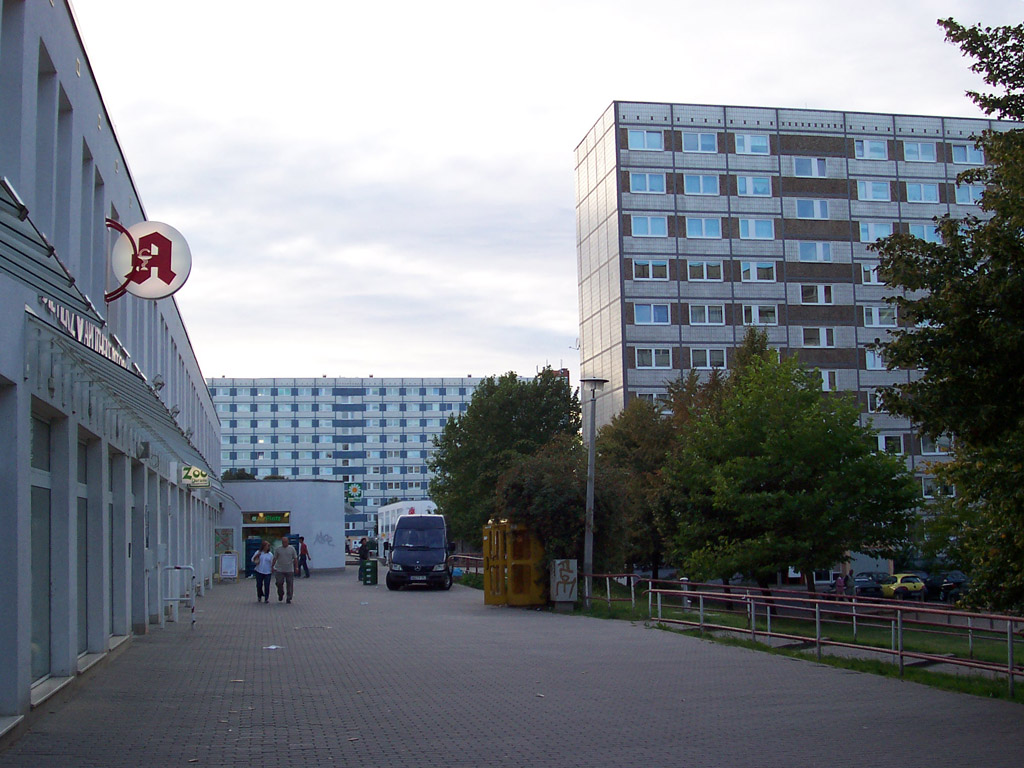 Das Neubaugebiet in Magdeburg Reform